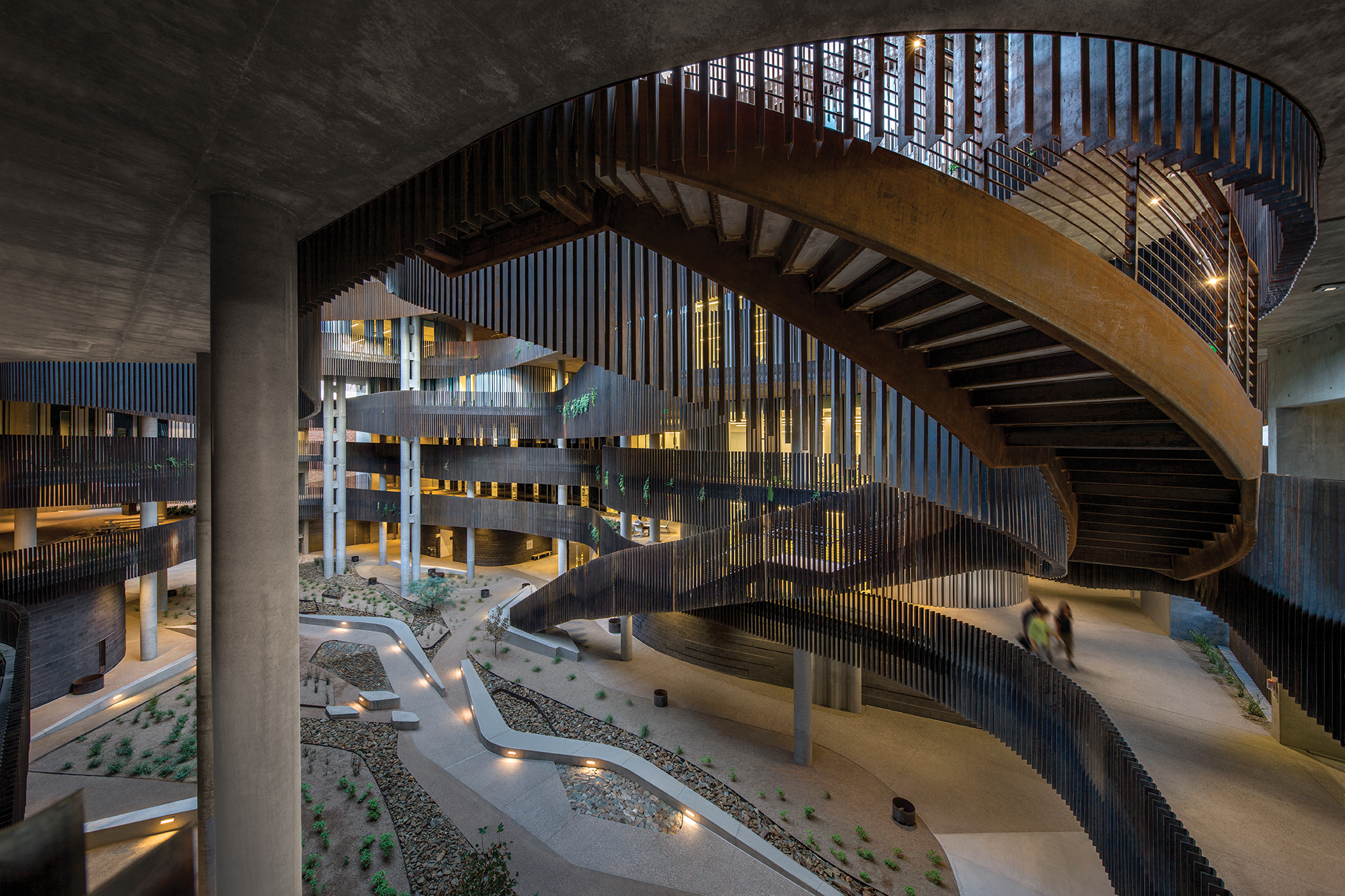 캠퍼스 빌딩의 파사드